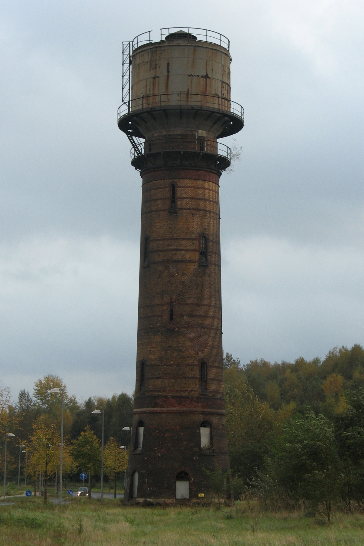 Baudenkmal Alsdorf, Wasserturm, Annagelände